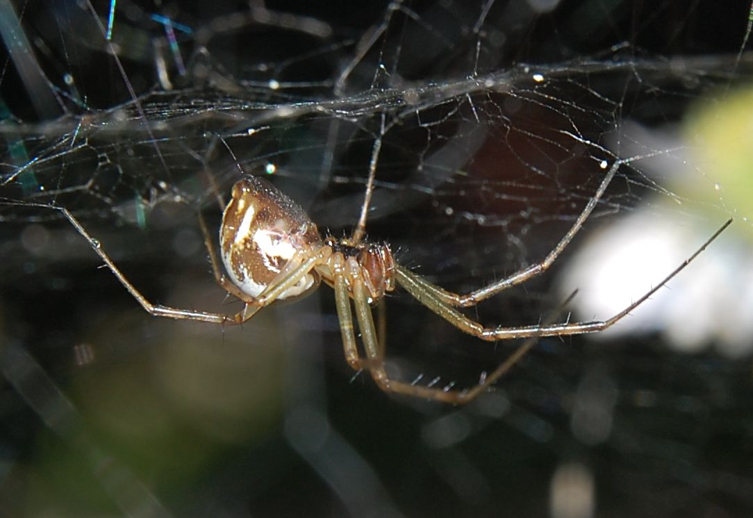 Linyphia triangularis, female